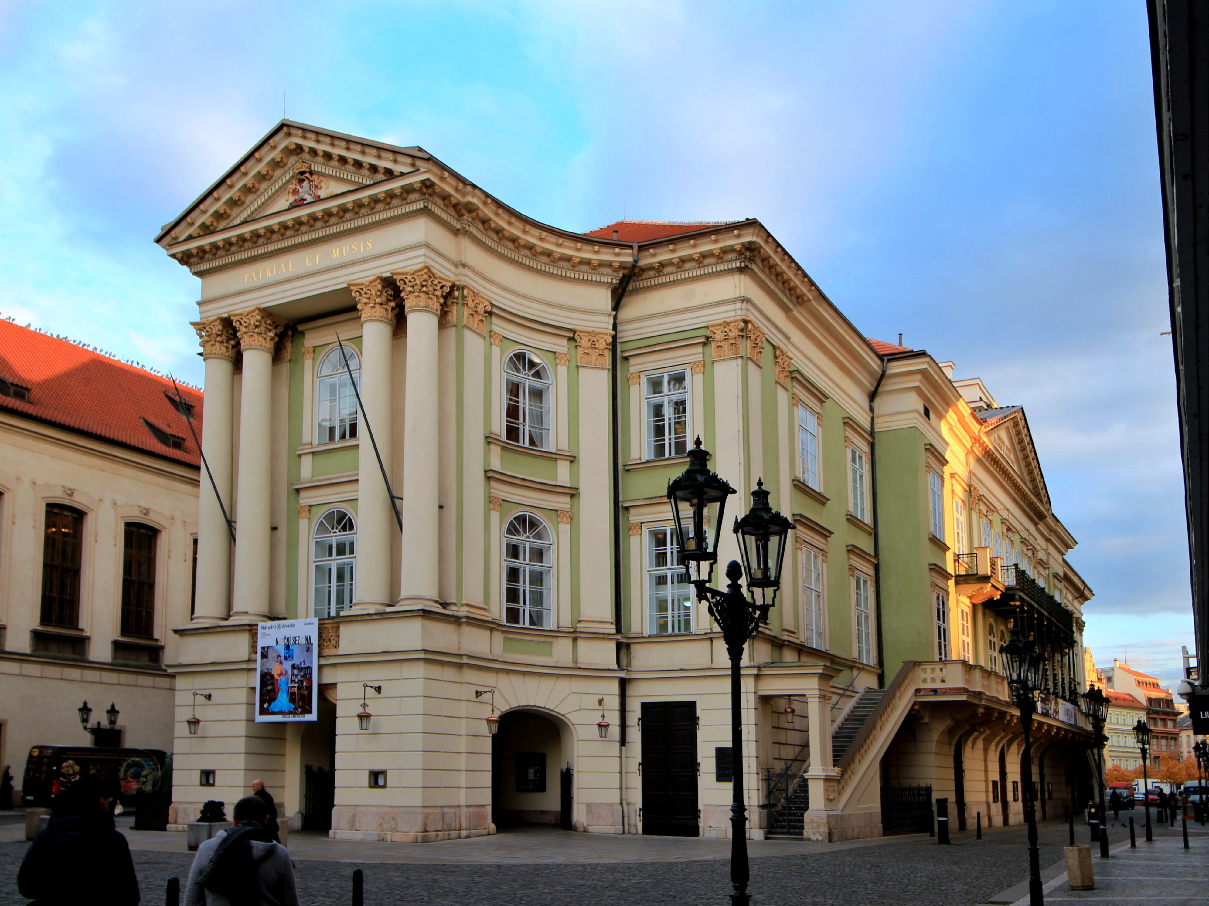 Stavovské divadlo v Praze